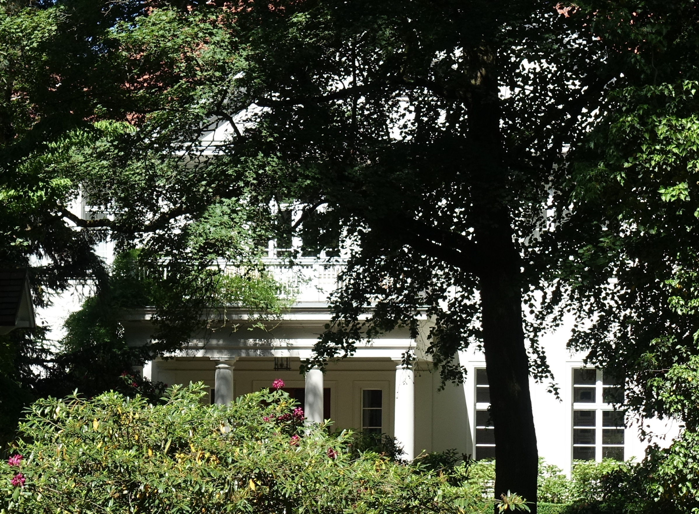 Villa